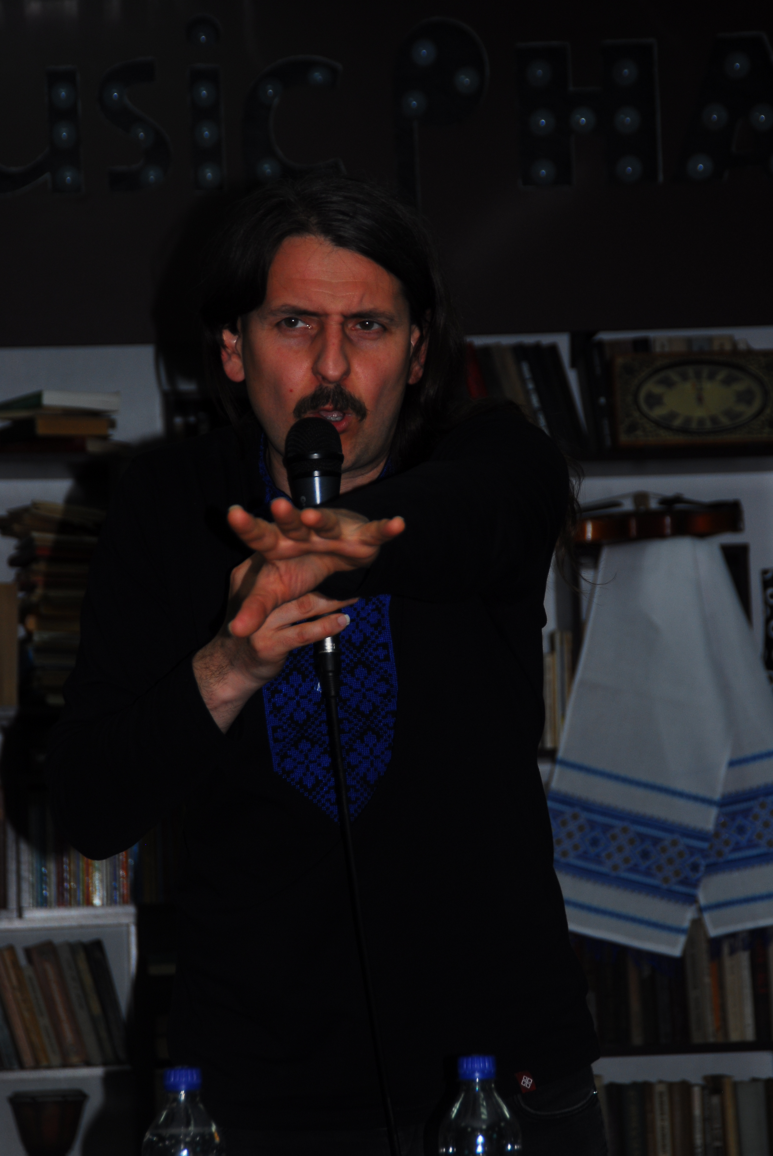 В Мелитополе